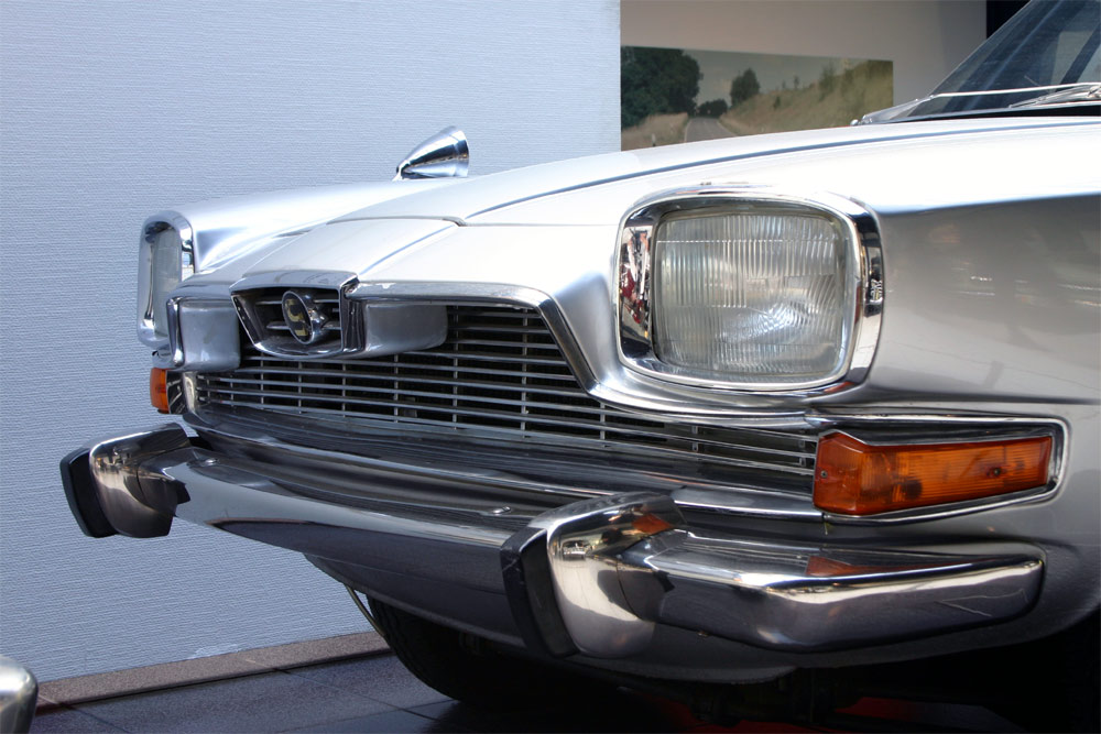 Glas 2600 V8 Coupe Fotografiert von Softeis, am 3.10.2004 im EFA-Museum für Deutsche Automobilgeschichte first upload in de wikipedia on 01:30, 5. Okt 2004 by Softeis